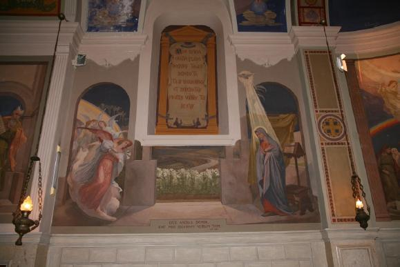 affreschi di Primo Panciroli, chiesa Maria SS Immacolata - Fiumefreddo di Sicilia (CT). foto di Giuseppe Nucifora